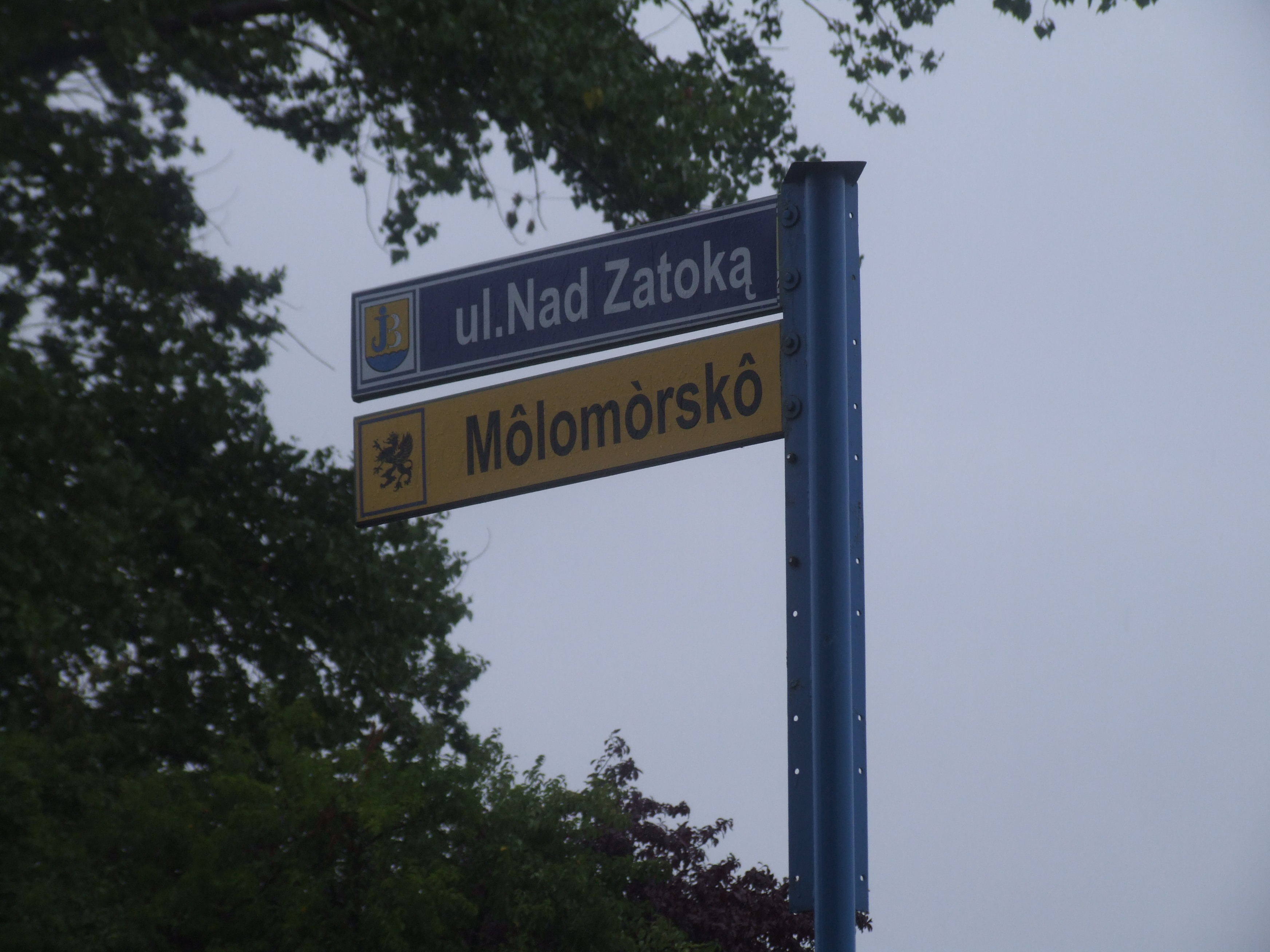 ulica Szyprów, Jastarnia